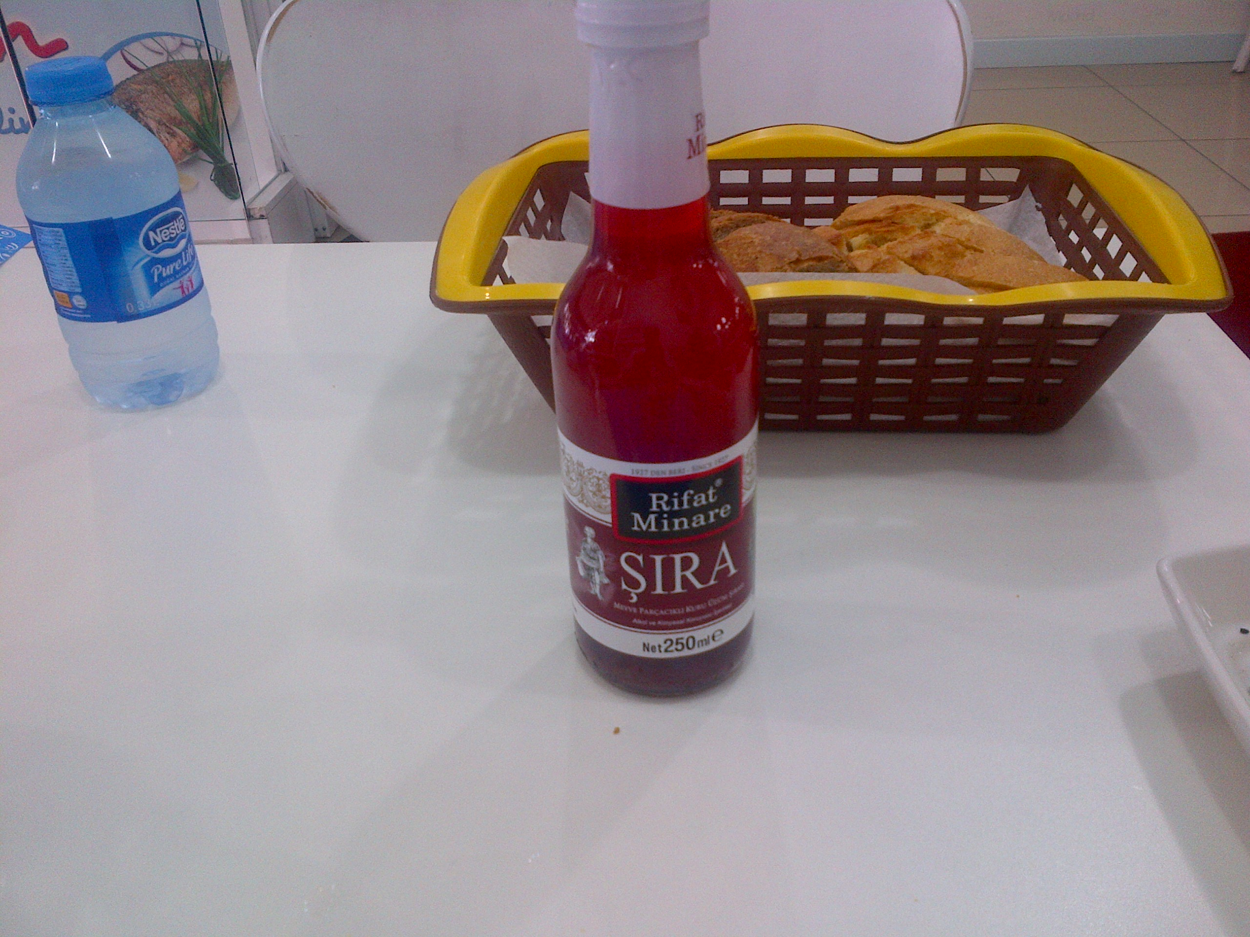 Bebida turca "şıra", generalmente se toma junto a "İskender" o "Bursa kebabı"